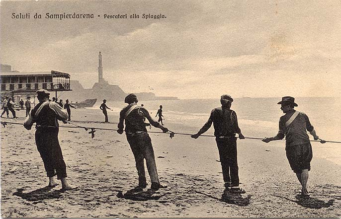 Pescatori a Genova-Sampierdarena in un'antica cartolina